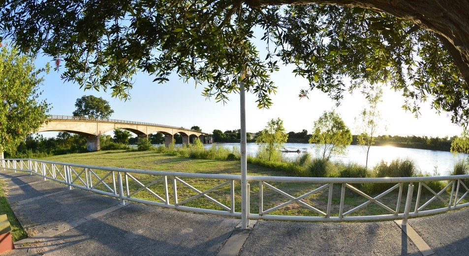 Адыгэбзэ: Paseo Costanero, ciudad de El Colorado, Formosa. Detrás el Puente Libertad.